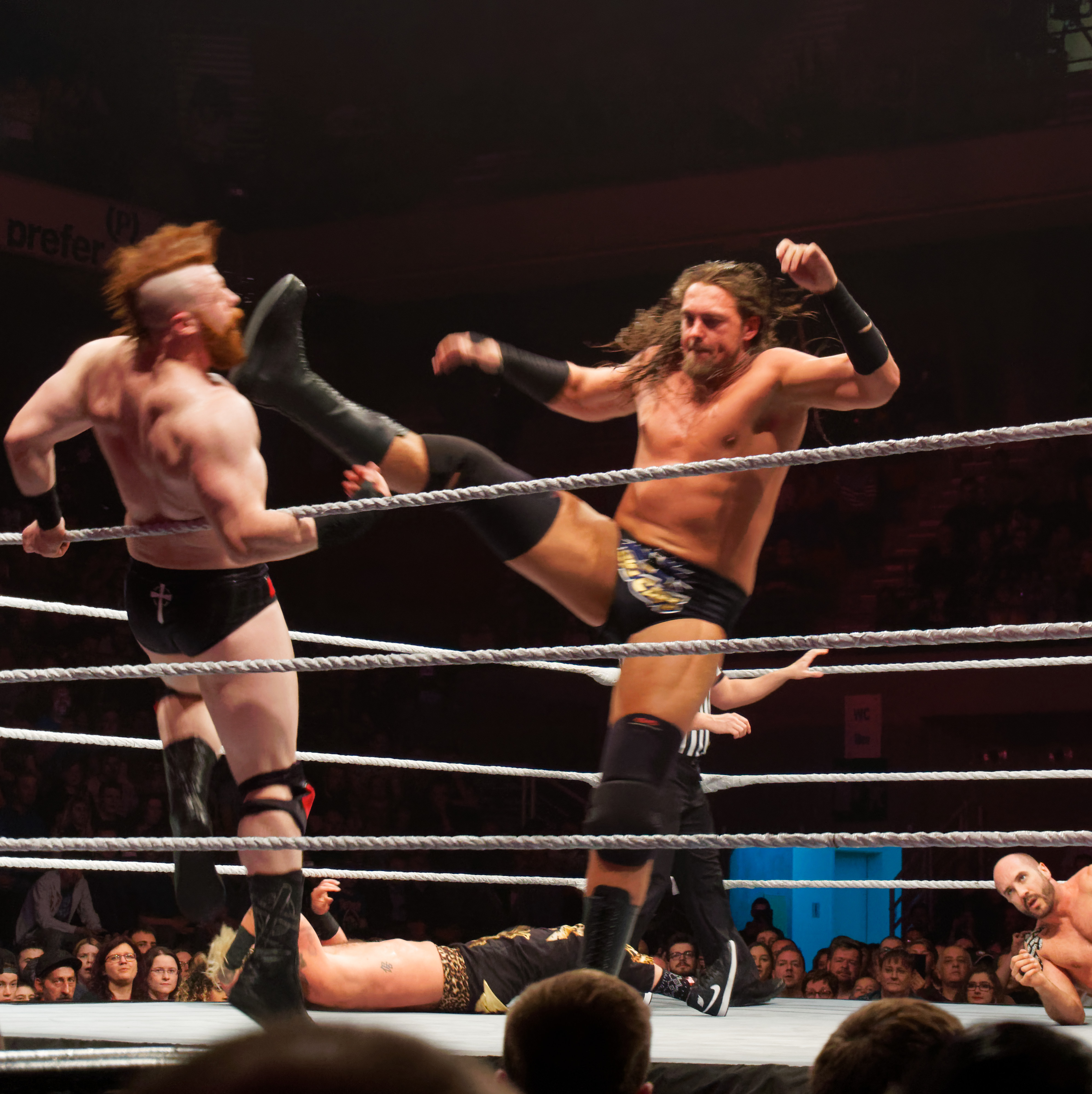 Jeff Hardy (c) & Matt Hardy (c) defeat Big Cass & Enzo Amore, Cesaro & Sheamus (in Triple Threat Match) Info on the match : WWE RAW Tag Team Title ( Le vendredi 12 mai, la WWE Live Tour fera escale au Country Hall a Liege pour le spectacle de catch de l'annee! Au programme: des duels impitoyables et des rencontres captivantes entre les meilleures equipes et les plus grands rivaux. )